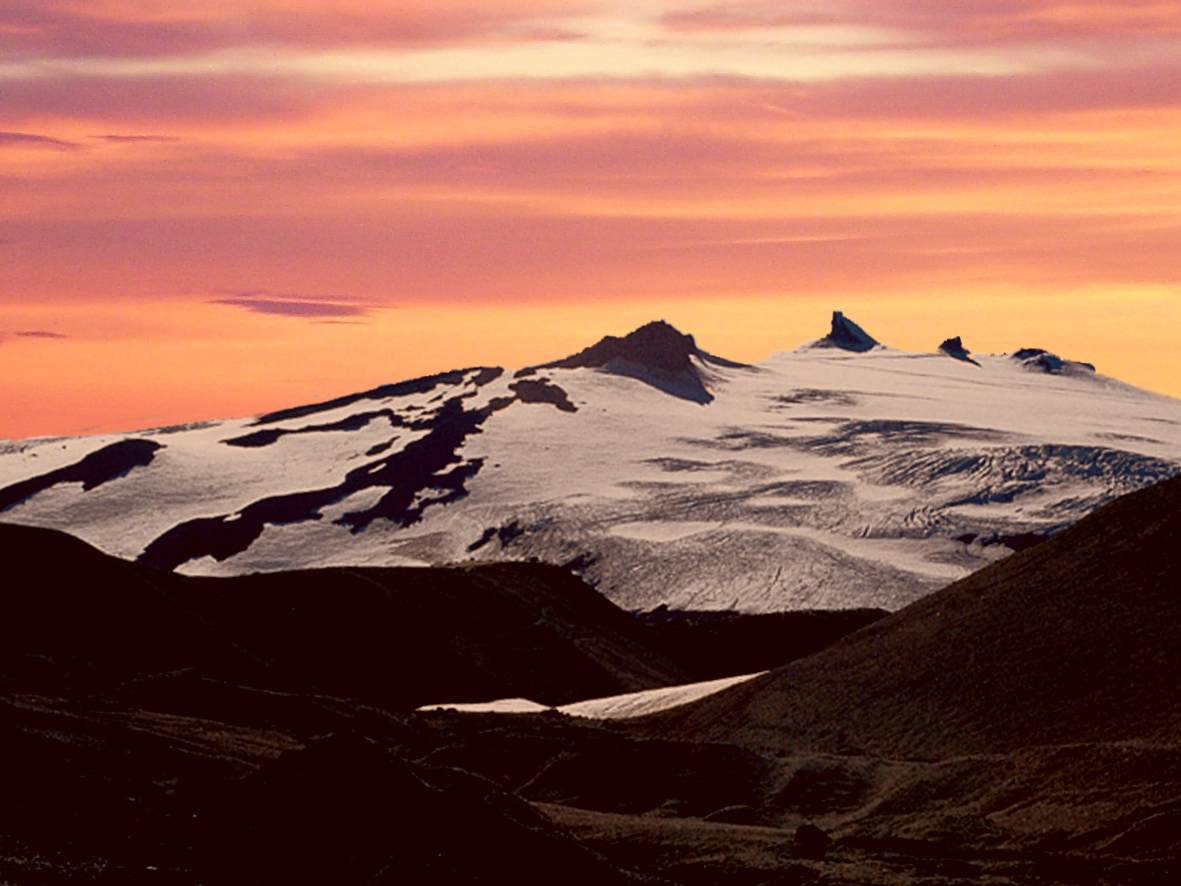 Snæfellsjökull in Iceland